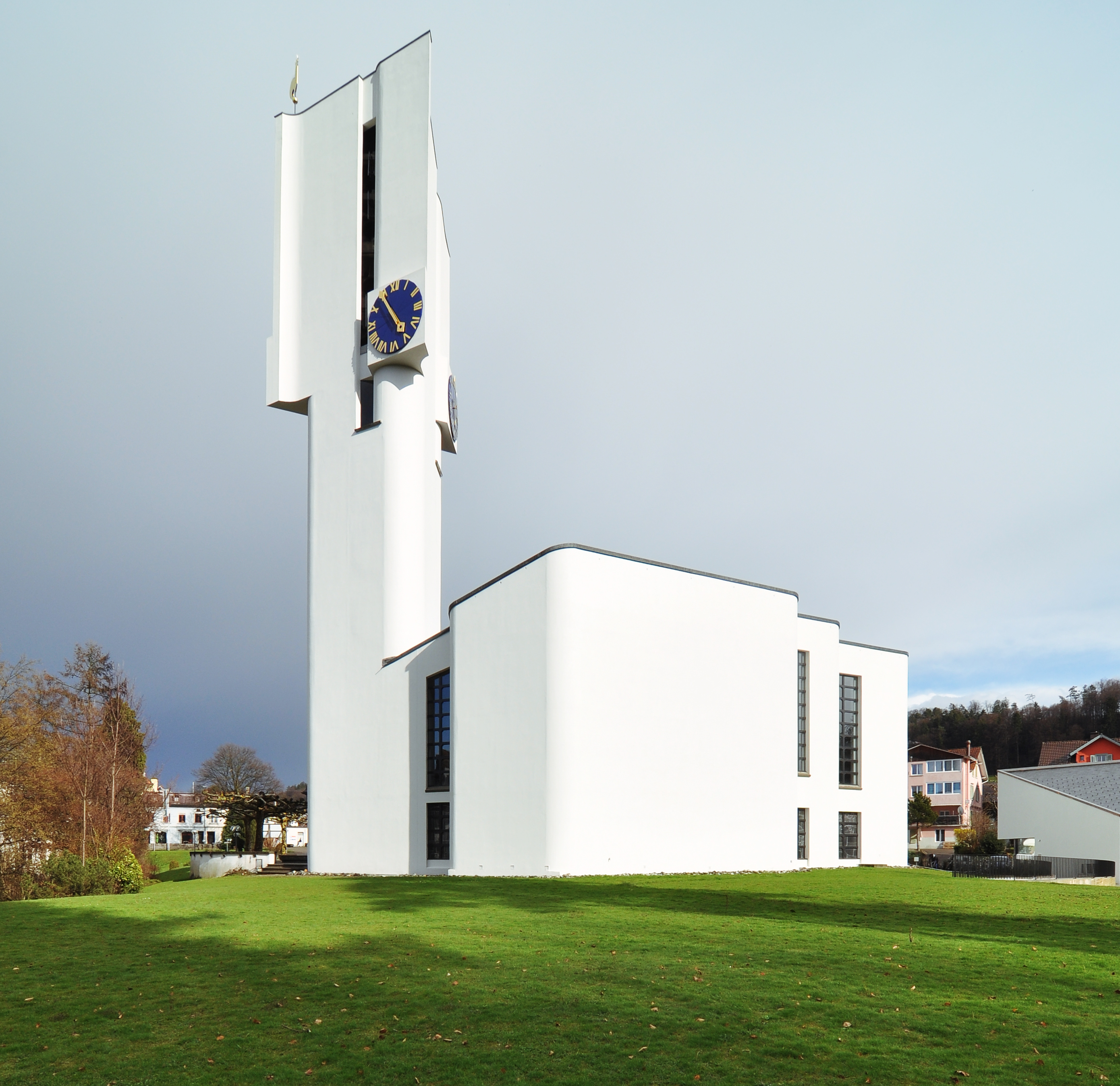 Reformierte Kirche, Bischofszell, 1968, Architekt: Benedikt Huber